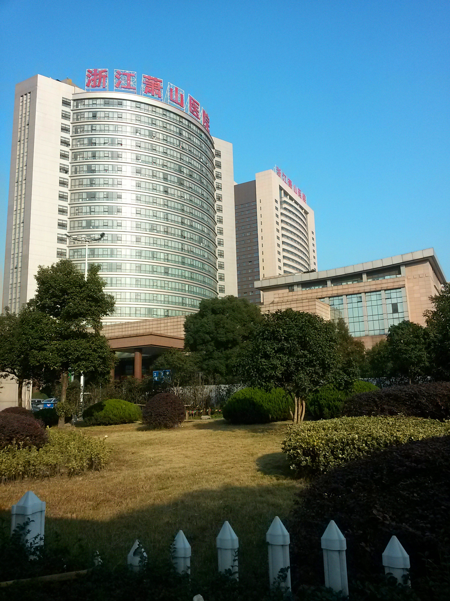 中文（中国大陆）: 浙江萧山医院